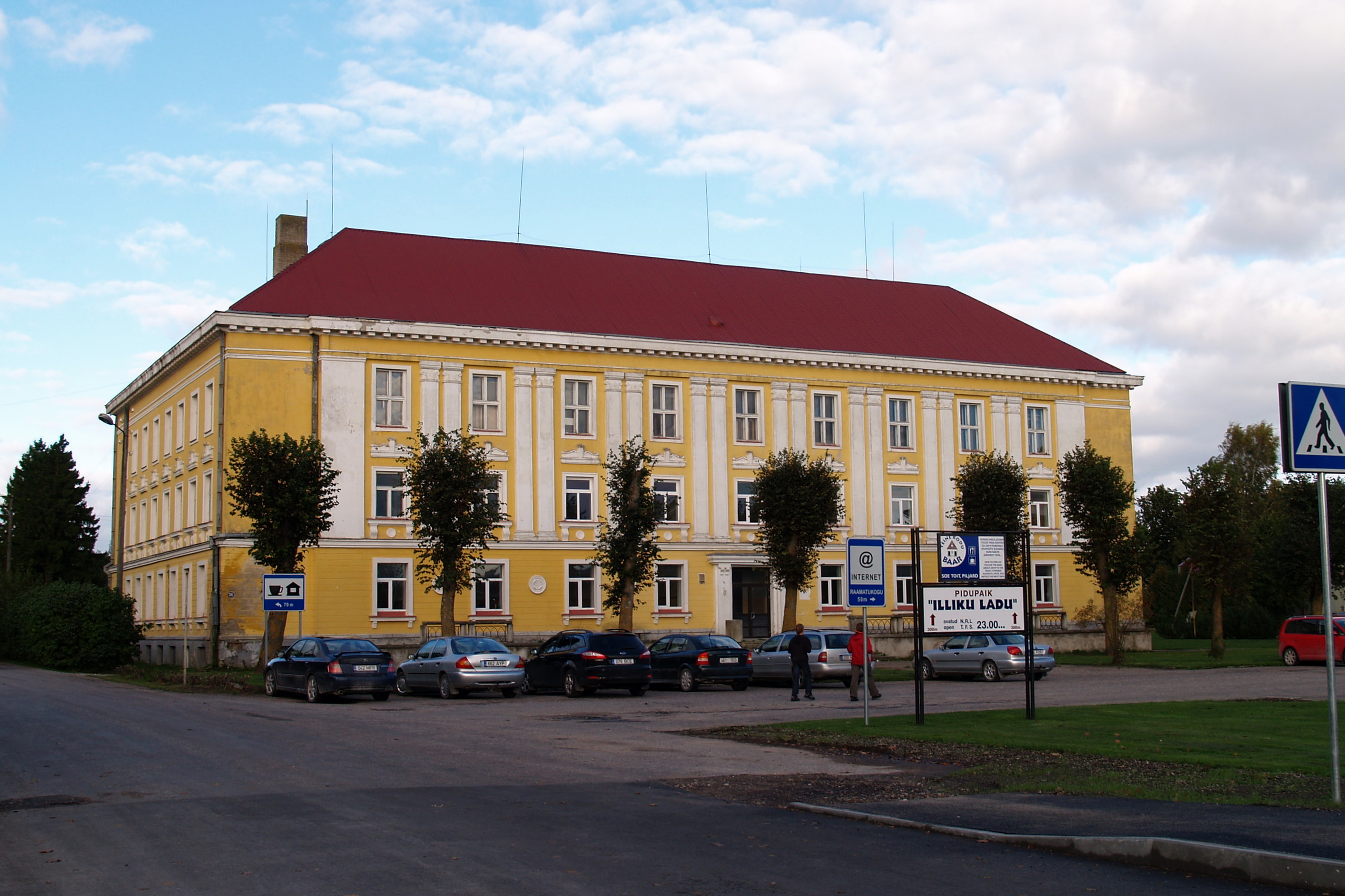 Orissaare